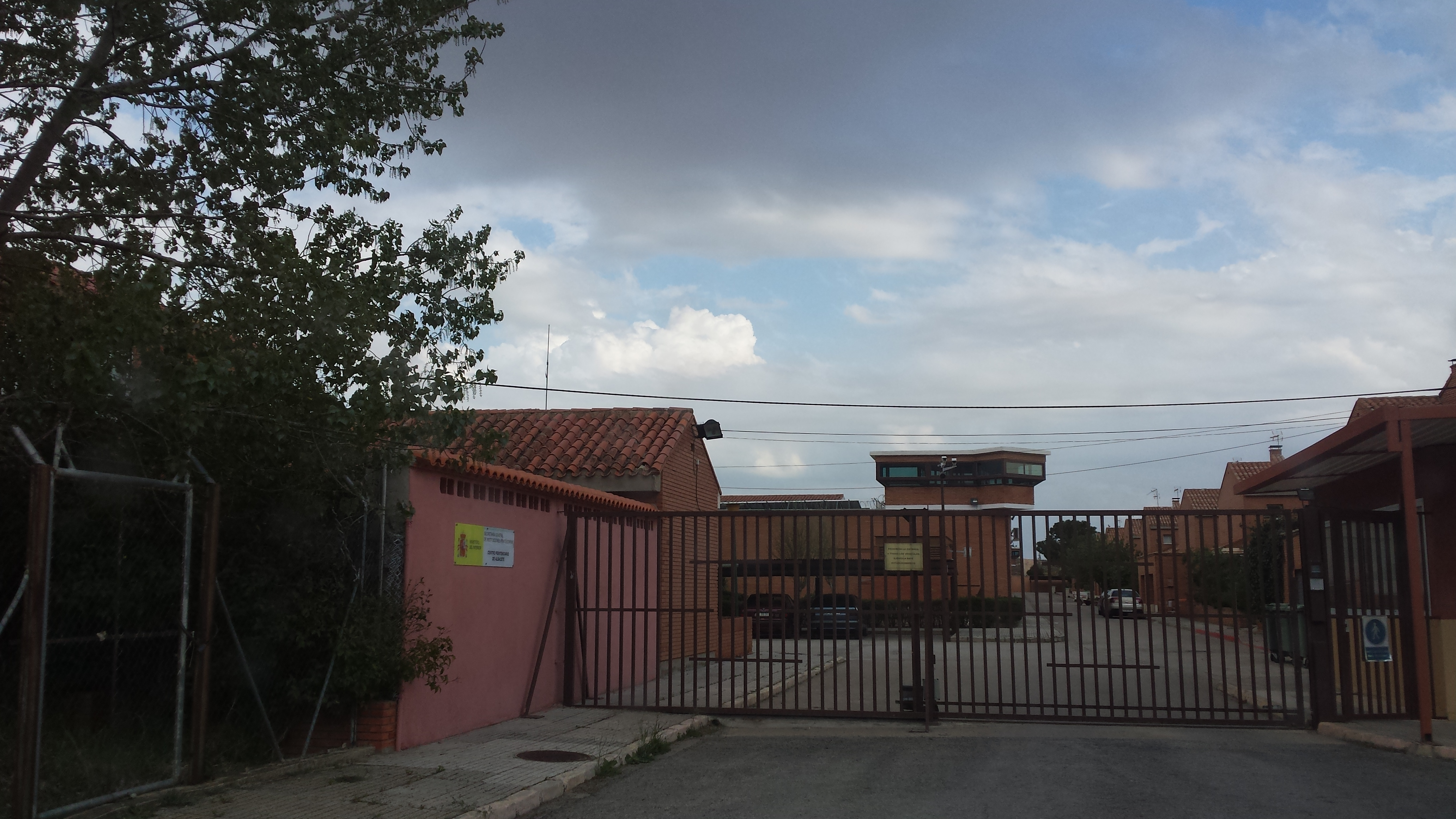 Cárcel de Albacete. Prisión de Albacete. Cárcel de La Torrecica